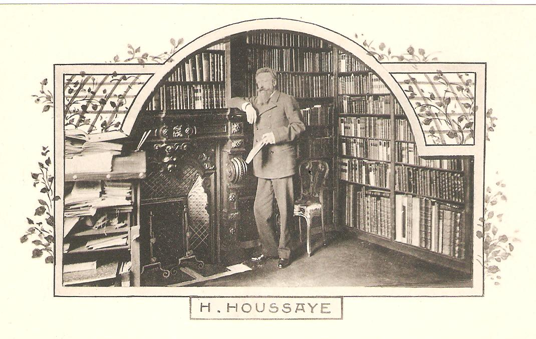 carte postale scannée